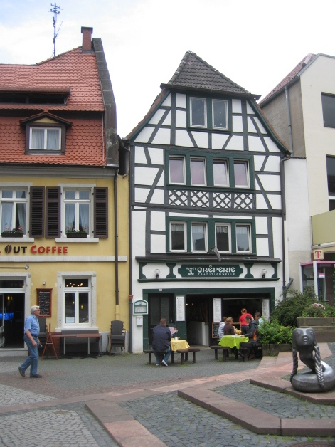 Hervé's Crêperie Traditionelle